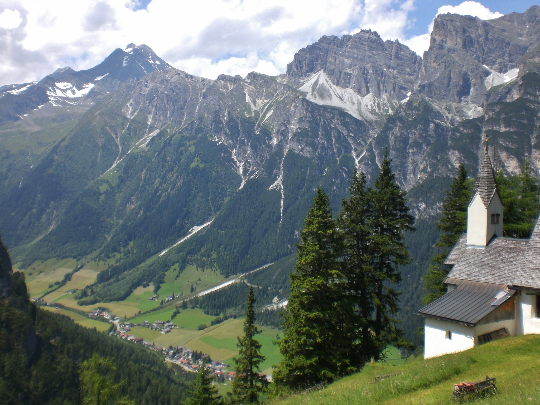 Von St. Magdalena schauen wir auf Gschnitz sowie zu Habicht, Kalkwand, Ilmspitze und Kirchdach (Spitze außerhalb des Bildes)